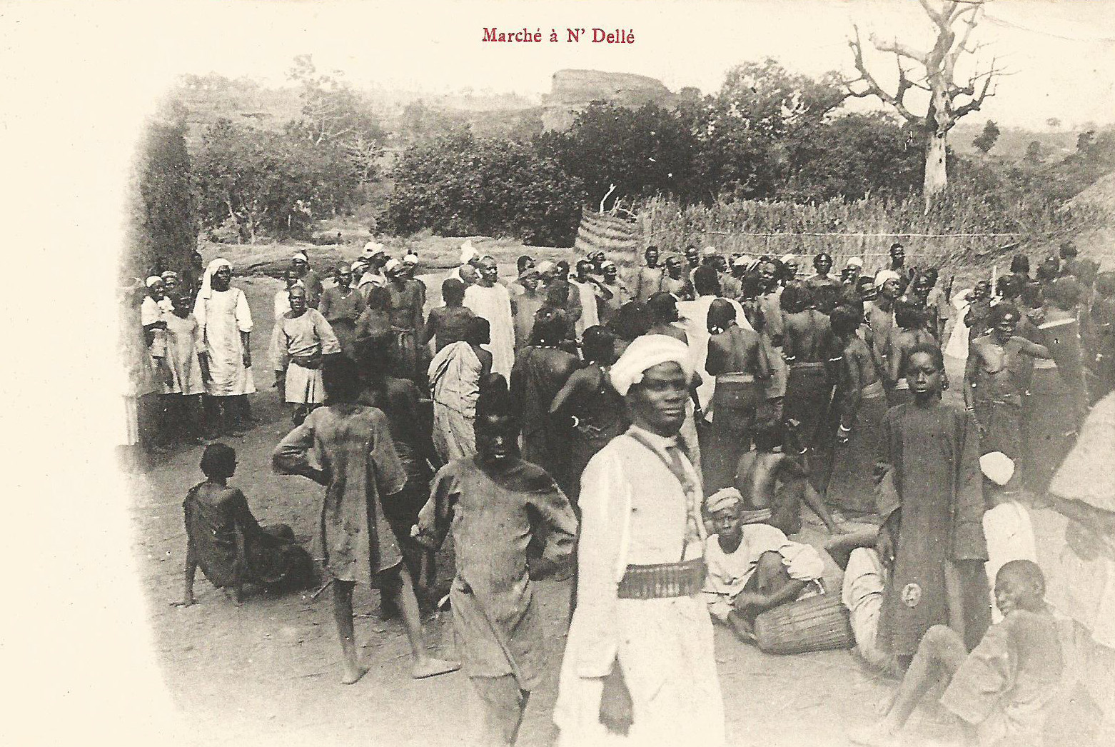 Marché à N'Dellé. Carte postale ancienne, sans indication d'auteur, d'éditeur ou de date. Collection particulière